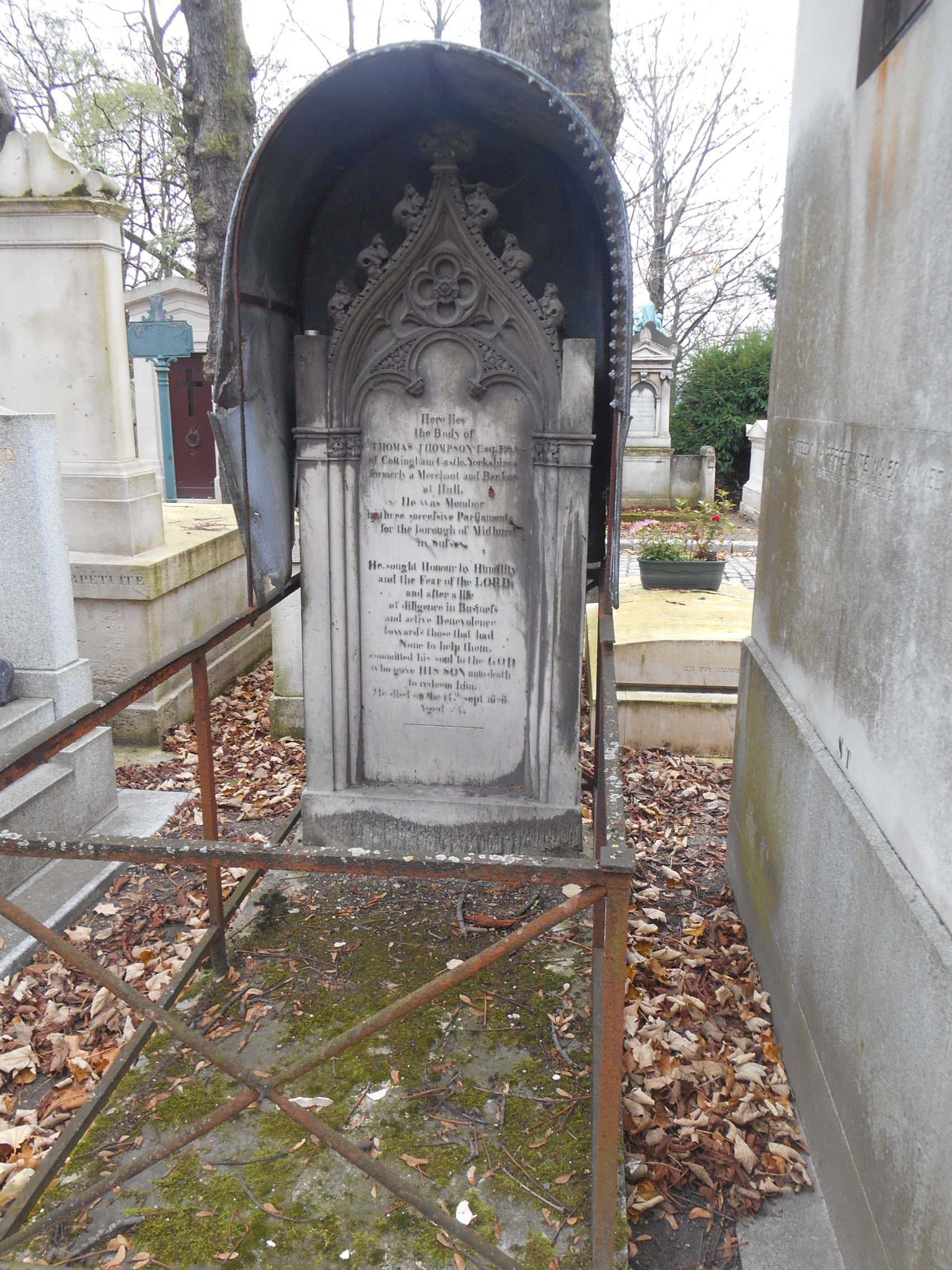 Tombe de Thomas Thompson Père-Lachaise, Paris